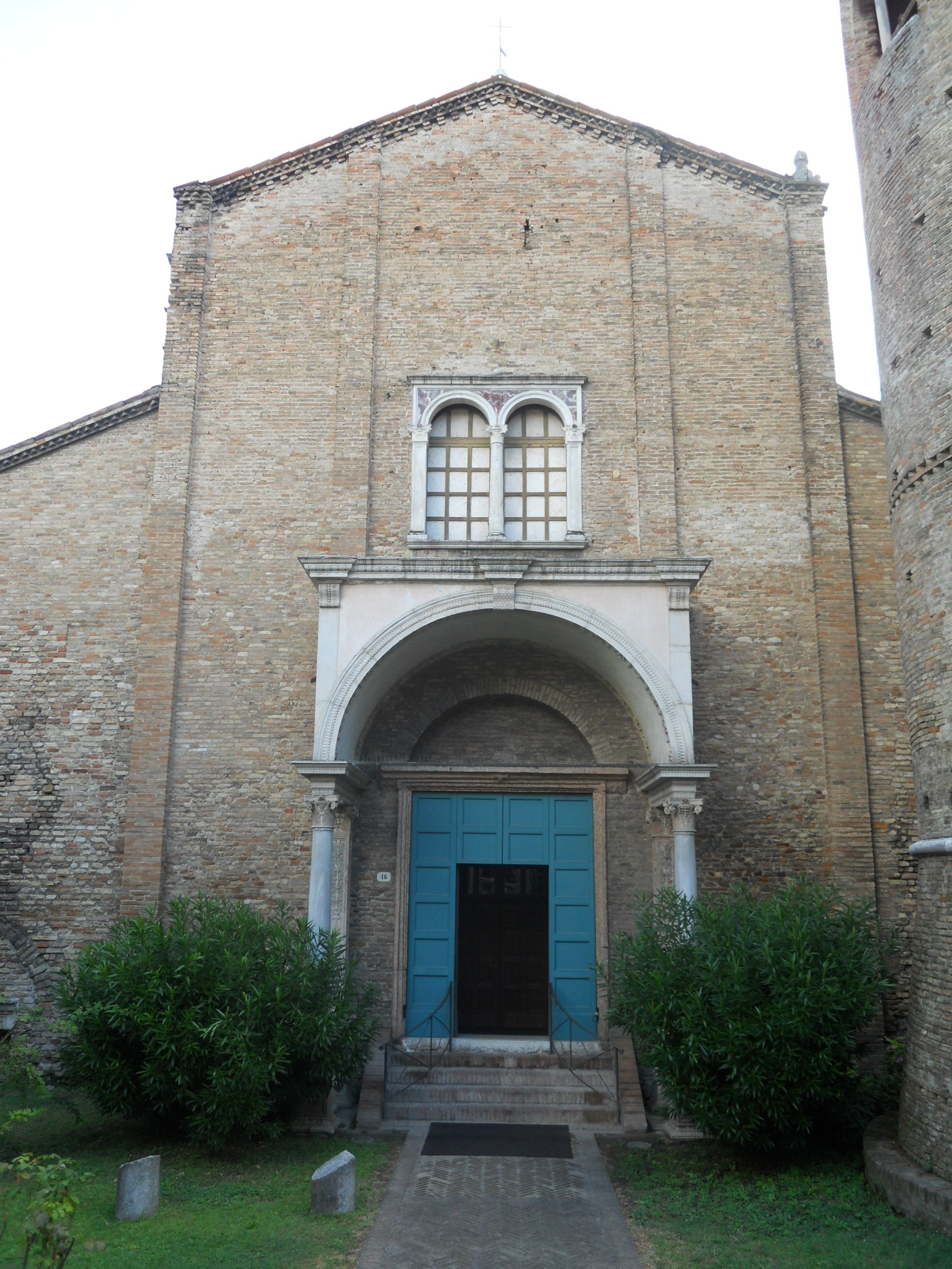 La parte centrale con la bifora e il protiro rinascimentali della facciata della Basilica di Sant'Agata Maggiore in Ravenna.